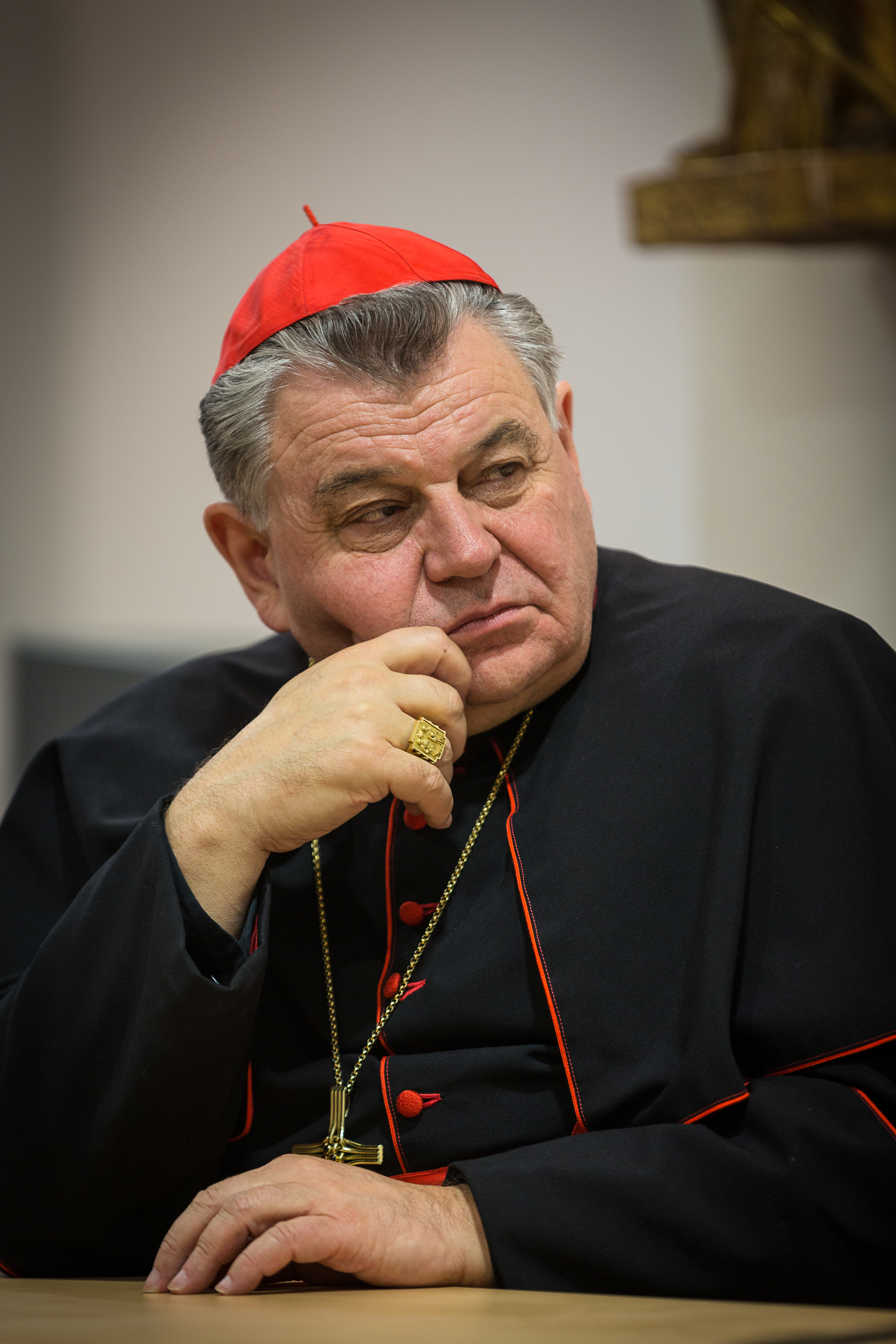 36e rencontres internationales de Taizé Strasbourg 28 décembre 2013